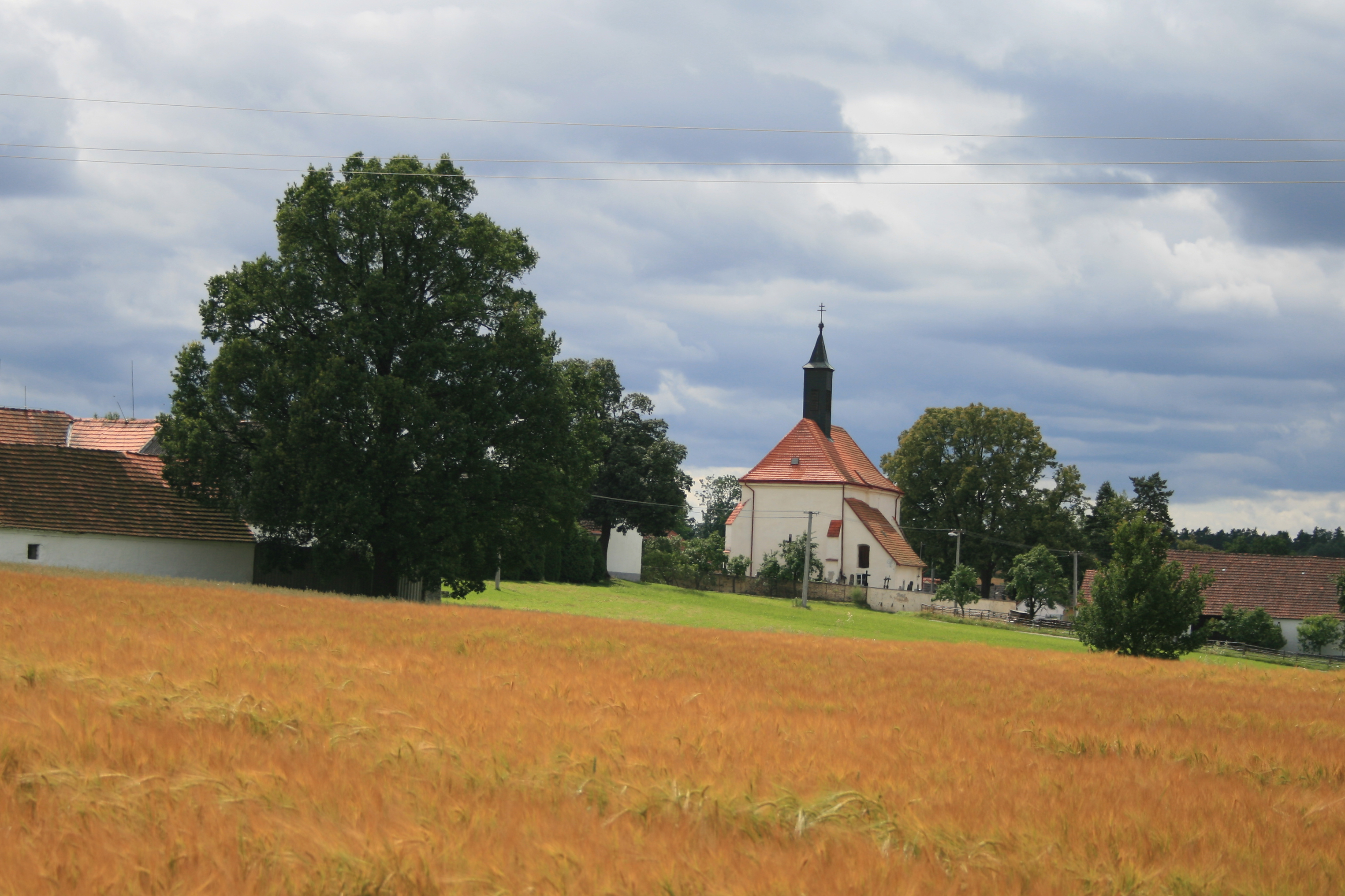 Kostel na návrší v Nedvědicích